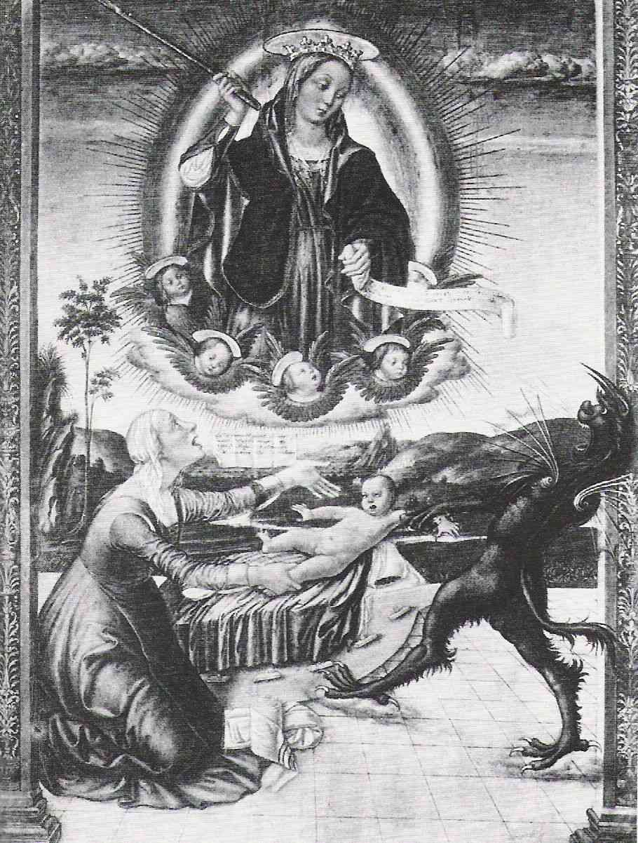 Die Madonna befreit einen Säugling aus den Fängen eines Dämons (15. Jahrhundert), Gemälde von Niccolò Alunno, Galerie Colonna Rom. Kopiert aus: Nicole Bettlé: Wenn Saturn seine Kinder frisst: Kinderhexenprozesse und ihre Bedeutung als Krisenindikator. Bern 2013. S. 55.